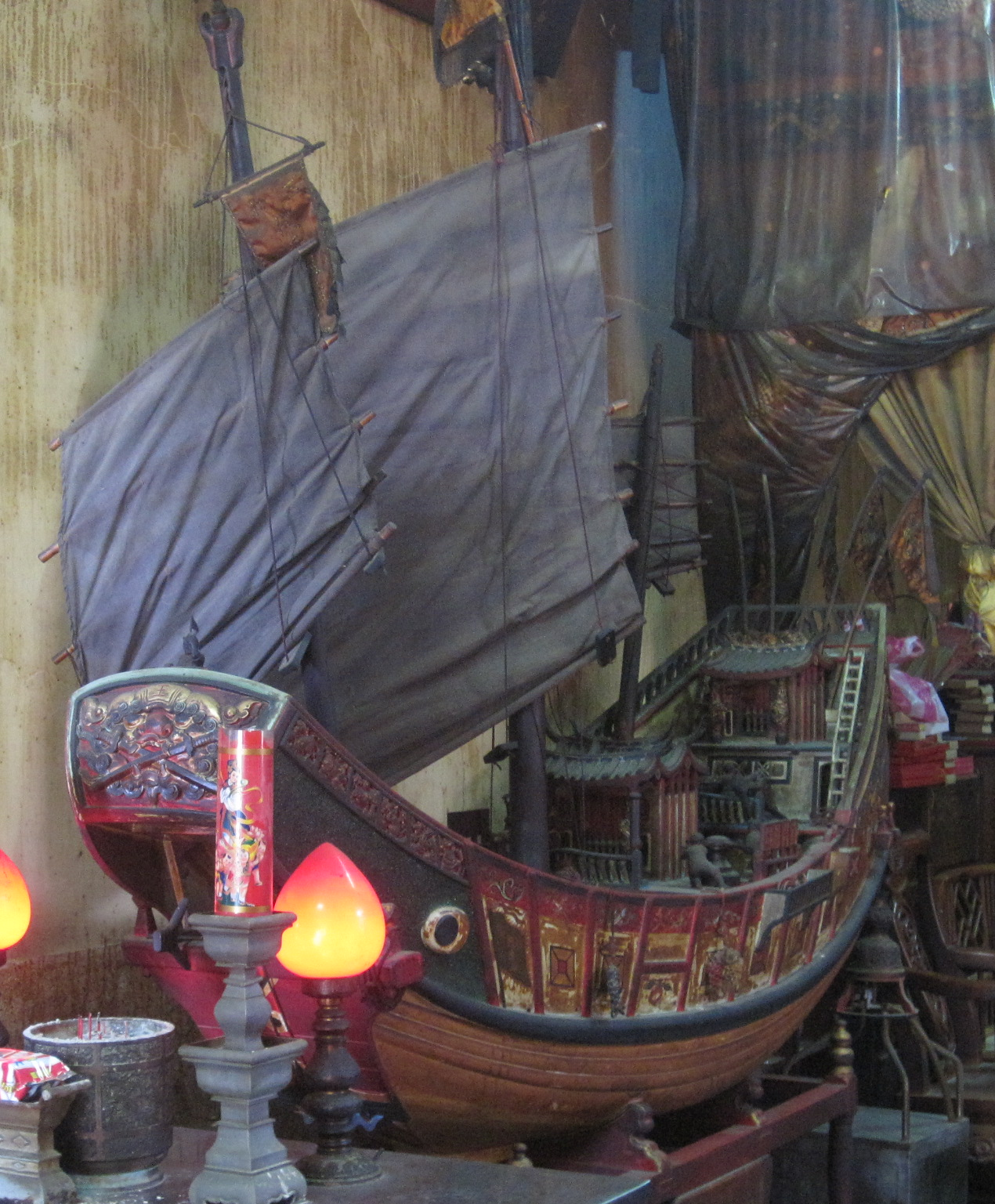 王船通恩號